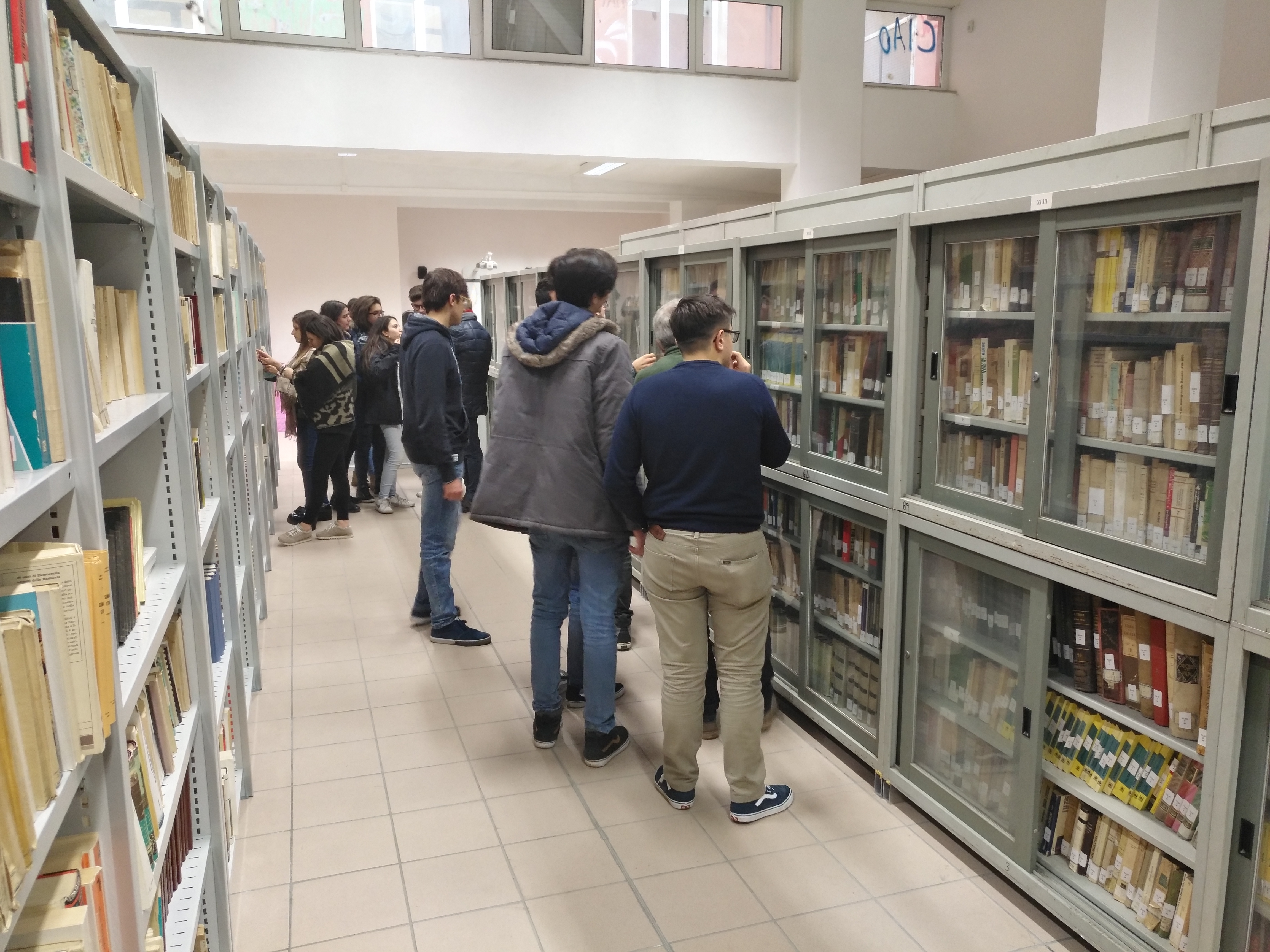 Studenti del Liceo classico statale Quinto Orazio Flacco di Potenza selezionano nella biblioteca della scuola le fonti da utilizzare per il percorso di alternanza scuola-lavoro con Wikimedia Italia